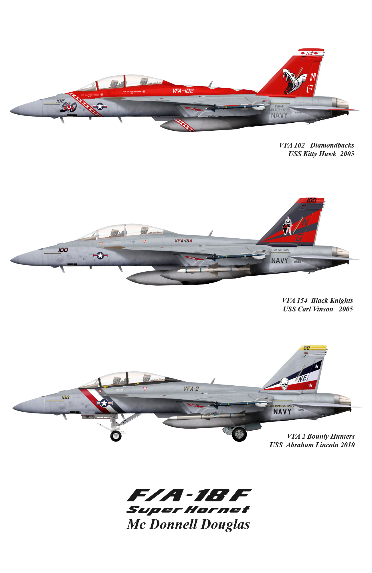 F/A 18 F super hornet different color scheme